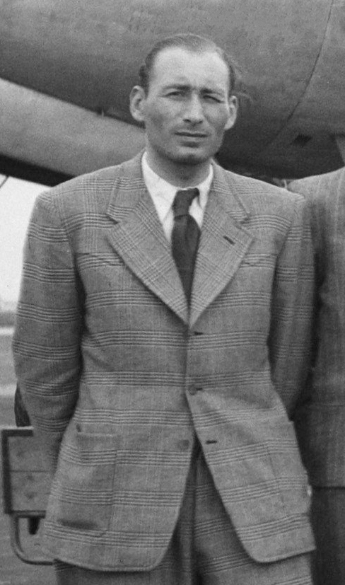 Nederlandse renners (ploeg Bloc Centauro) die deelnemen aan de Ronde Van Spanje (7-30 mei) : vlnr. Huub Sijen...